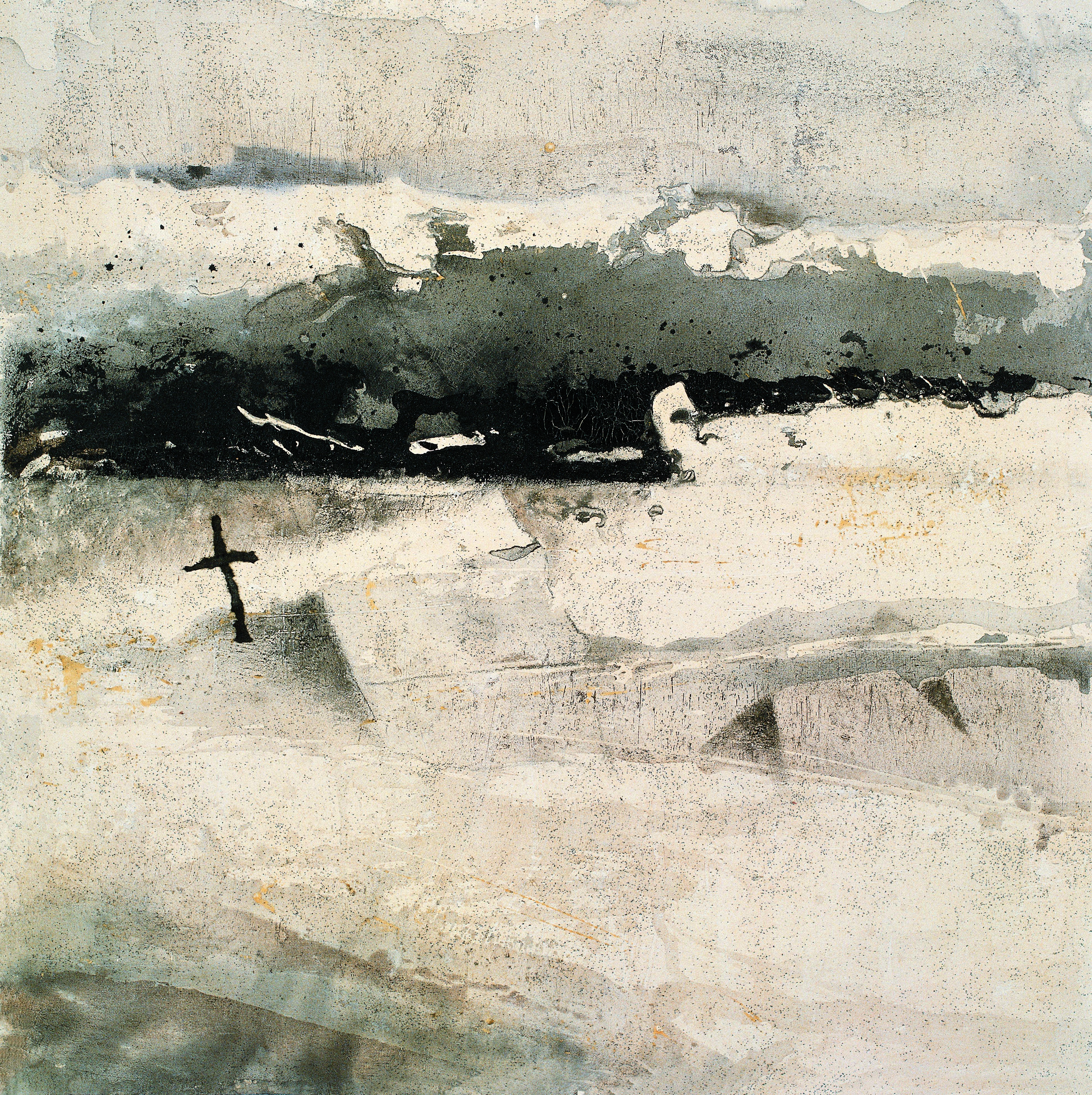 La Nuit Transfigurée de Li Chevalier